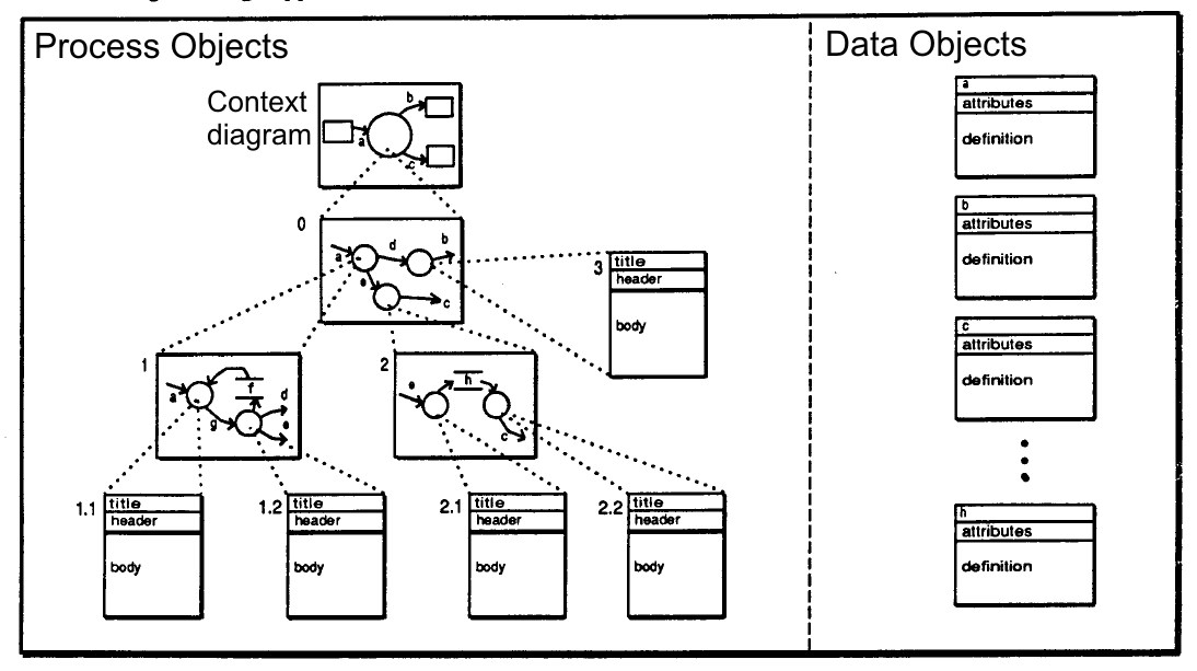 Analysis_Model_Objects